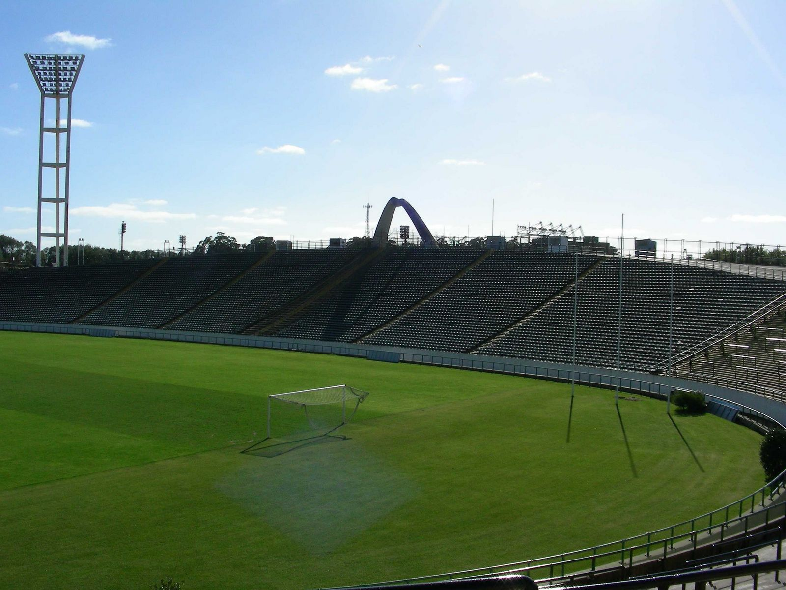 José-María-Minella-Stadium 1978